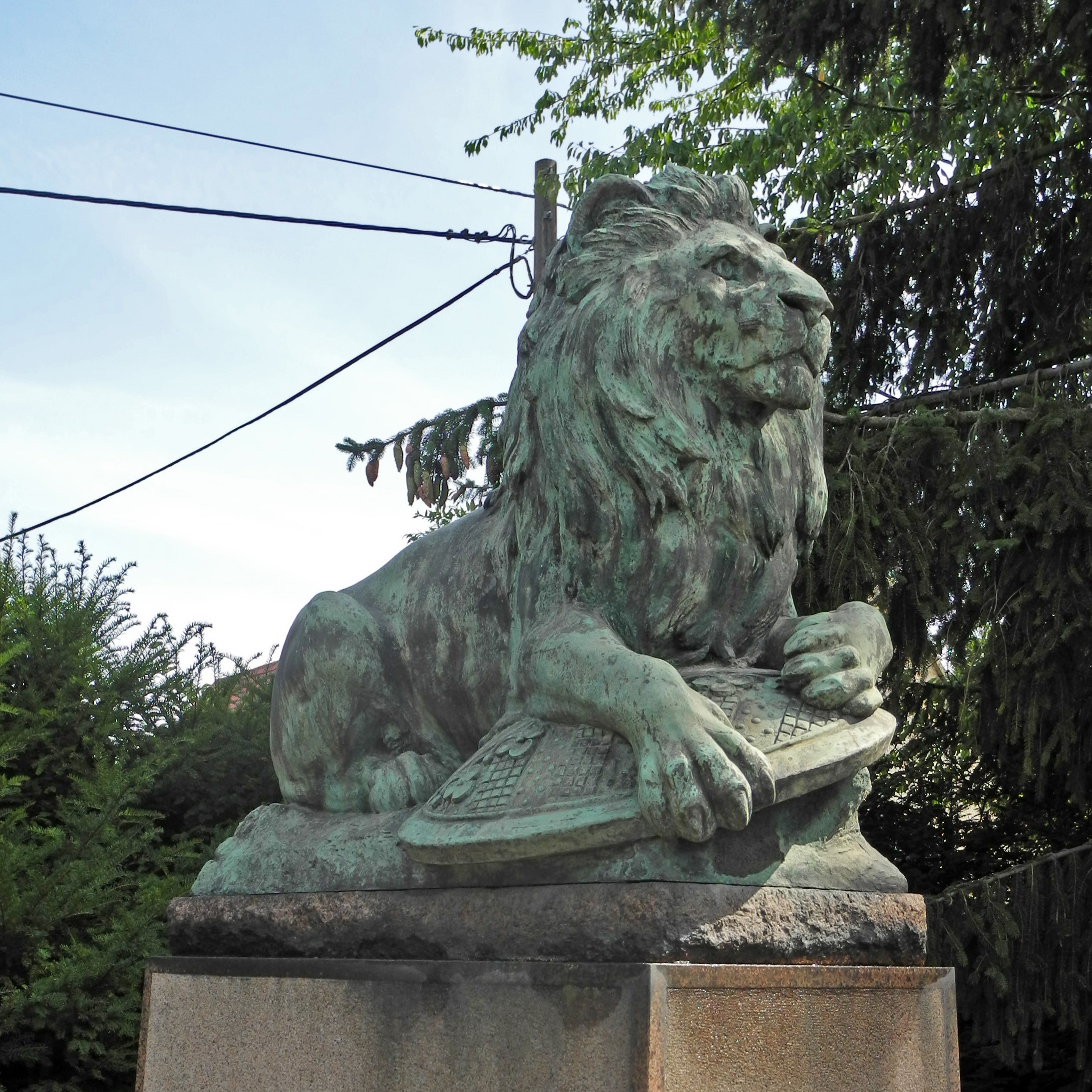 Kriegerdenkmal 1. Weltkrieg in Grumbach, vor dem Haus Tharandter Str. 21, Bildhauer: Clemens Grundig